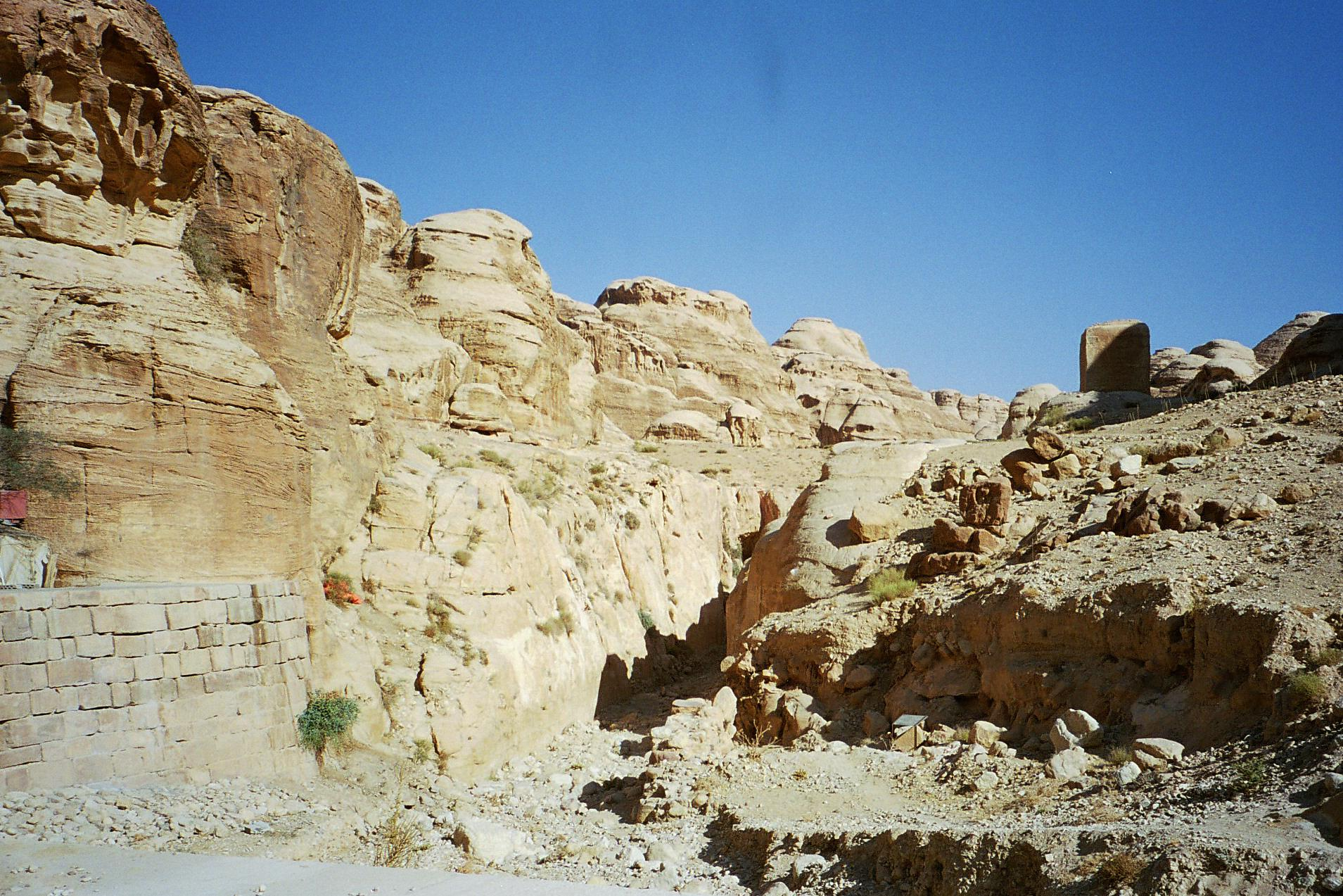 On the left, a dam protects the entrance of the Siq (located about 20m behind the dam, outside the picture), the main entrance of Petra (Jordan) from violent floods. The canal visible in the center leads to a tunnel. Entrée du site de Pétra (Jordanie). A gauche de l'image on peut voir un barrage protégeant des crues l'entrée du Siq (distante d'une vingtaine de mètres, sur la gauche hors de l'image). Au centre, le canal visible mène à un tunnel.